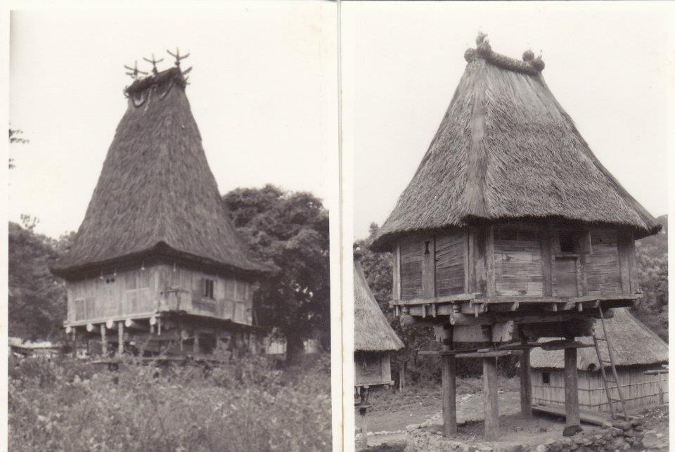 Moro--Lautem